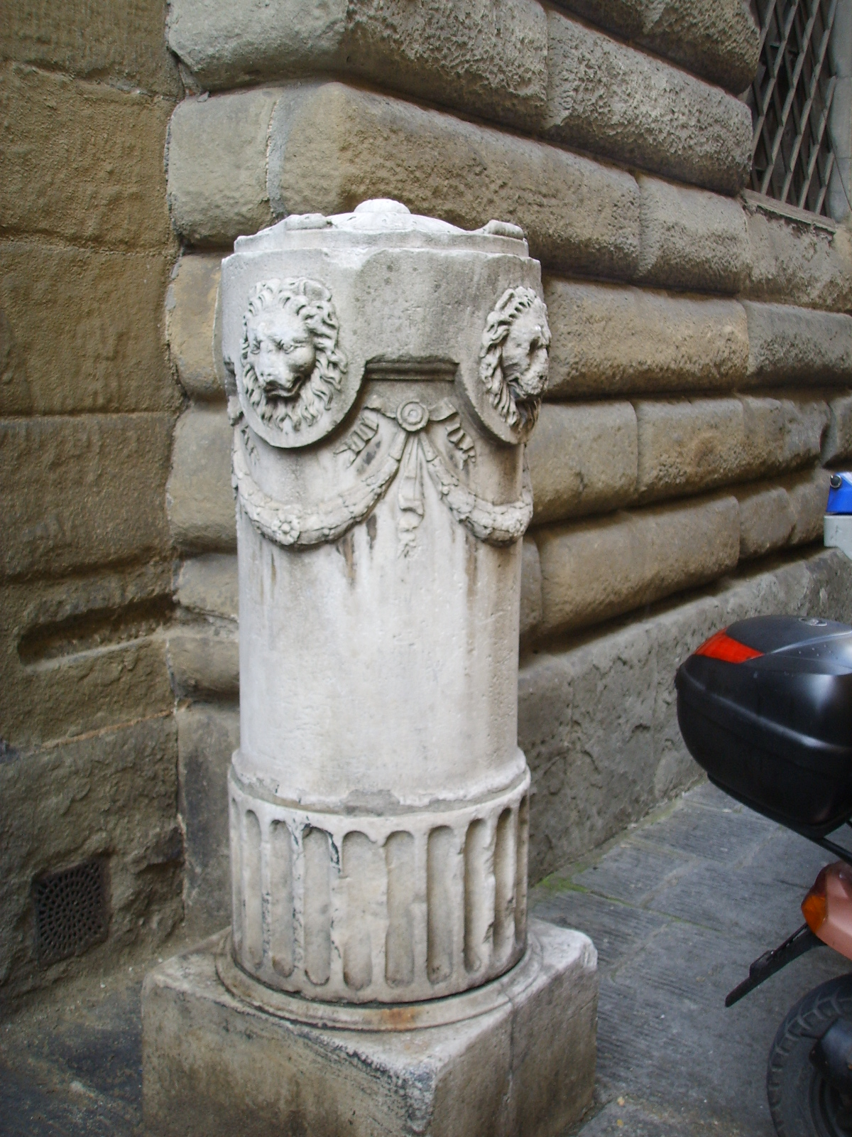 Palazzo borghese, cippo